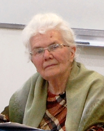 Доцент кафедры истории русской литературы и фольклора Саратовского университета им. Н. Г. Чернышевского Г. Ф. Самосюк